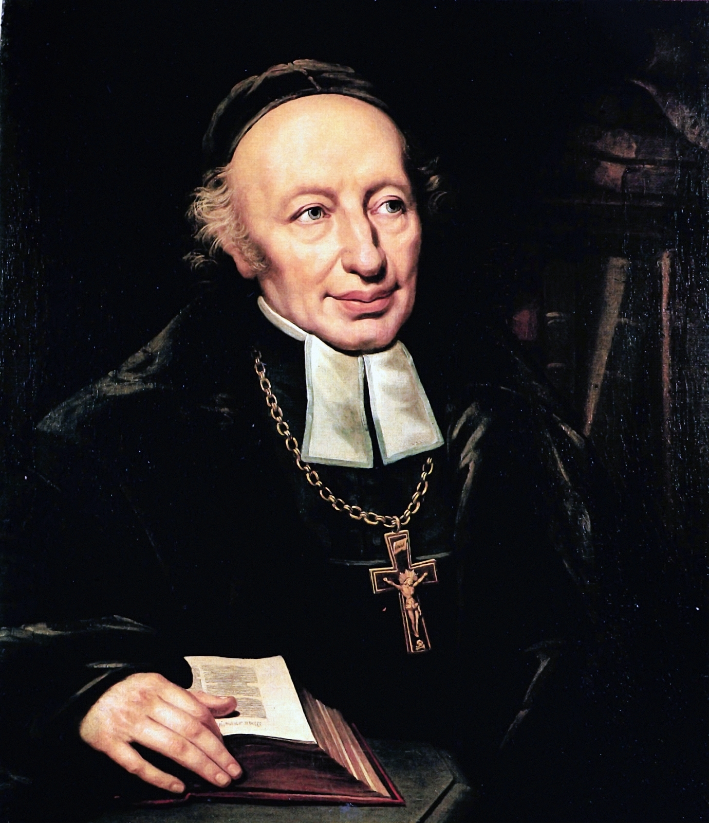 Fessler Ignác Aurél portréja